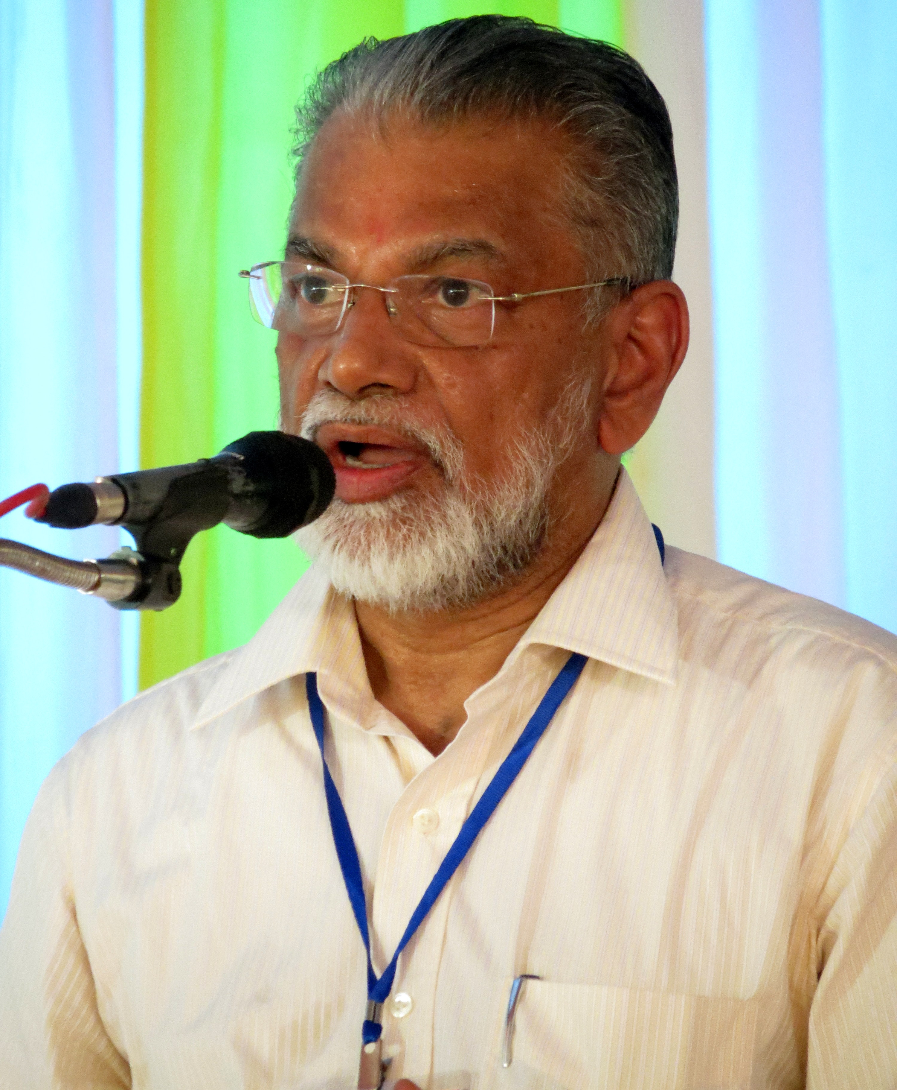 K Radhakrishnan, ISRO